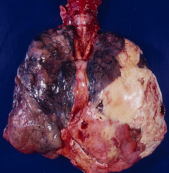 Empyema